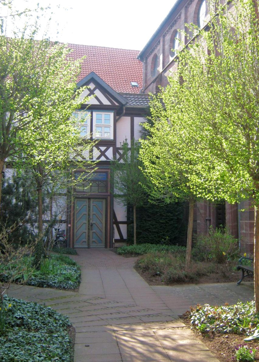 Eingang zum Ursulinenkloster, Neutorstraße, Duderstadt